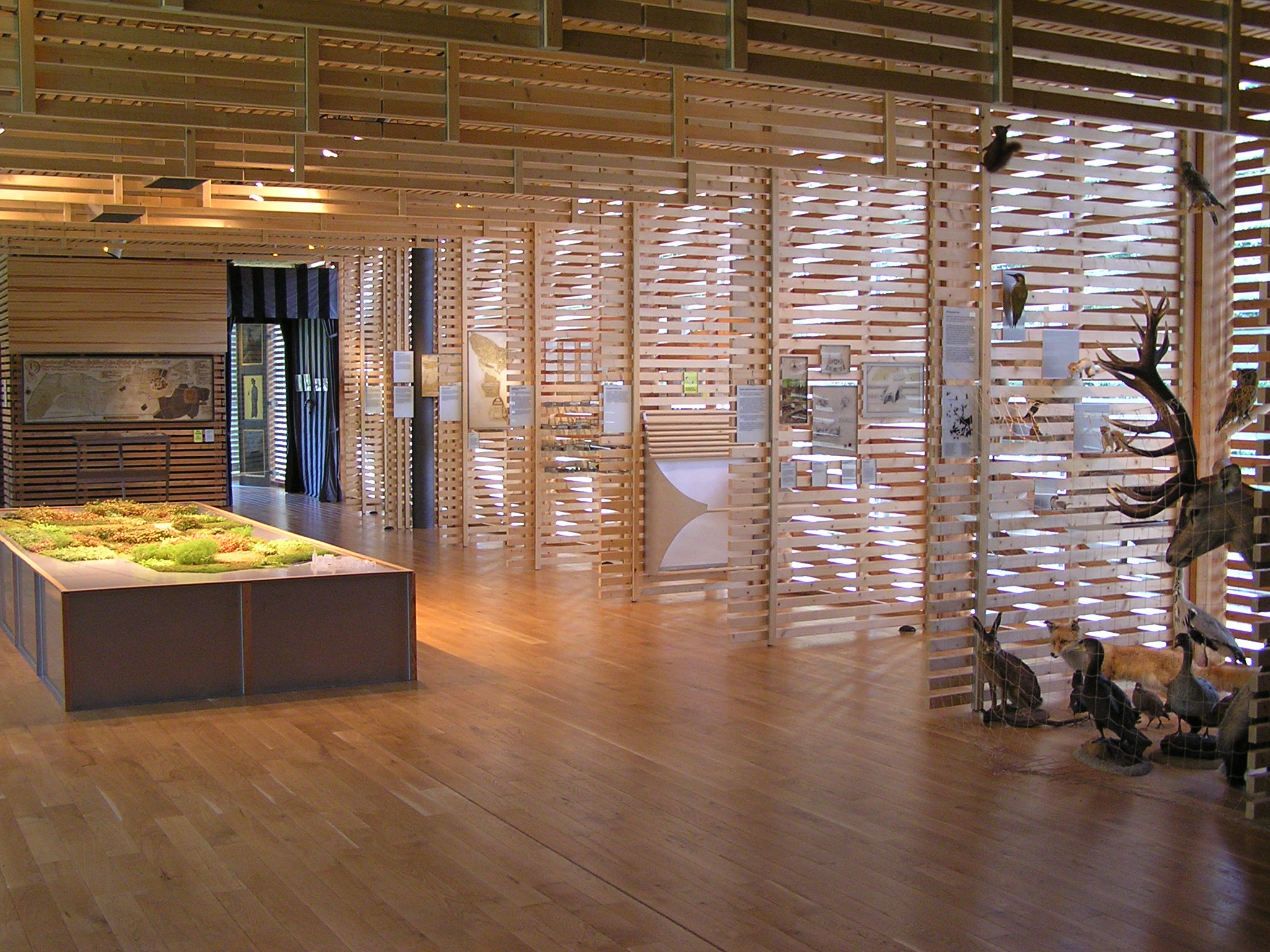 Ausstellung “Auftritt einer Kulturlandschaft – Tiergarten Schloss Raesfeld” im Besucher- und Informationszentrum Tiergarten Schloss Raesfeld